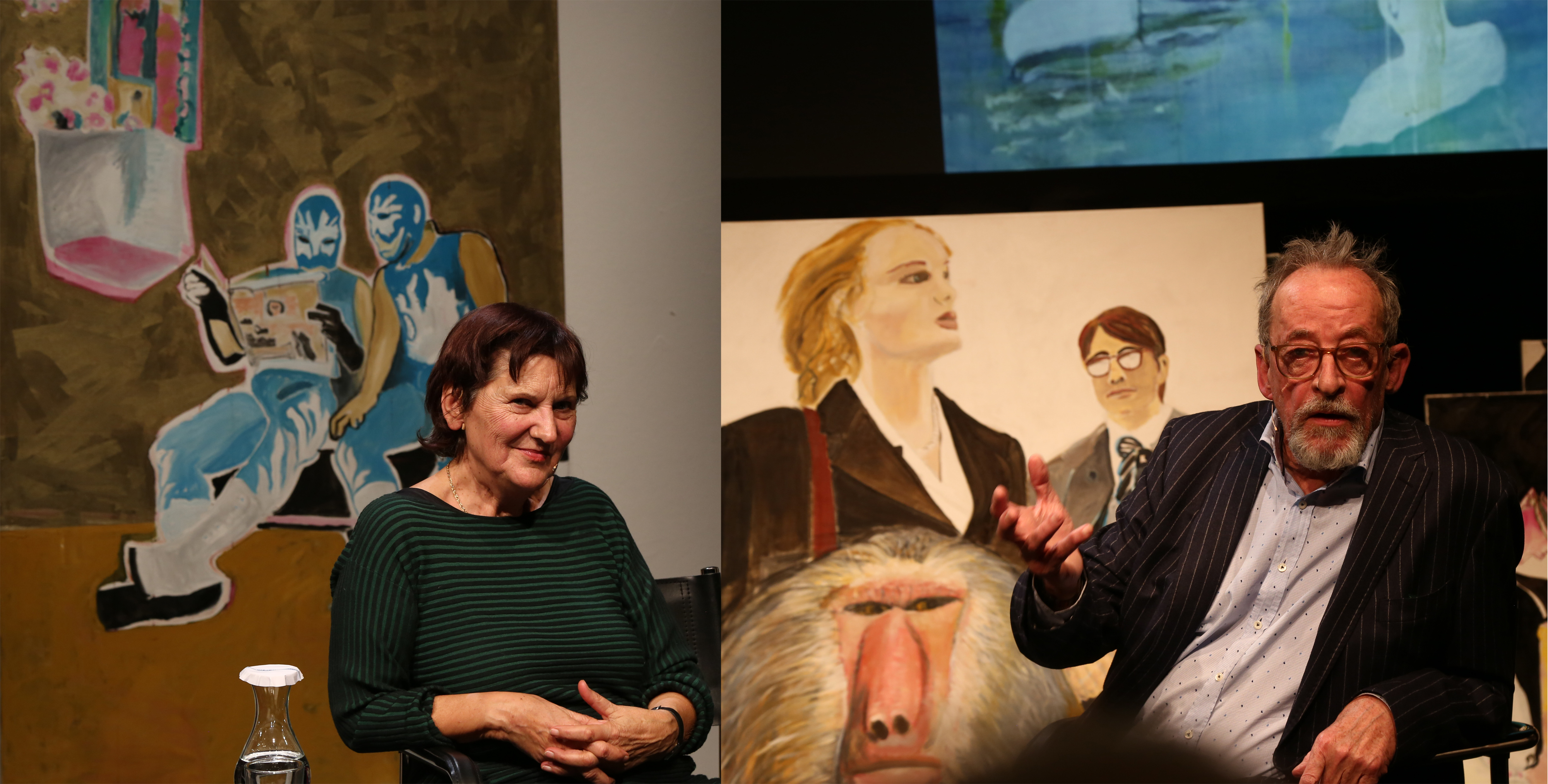 Lisa Endriß & Kasper König, Artist Talk in den Münchner Kammerspielen am 16.1.2018 /